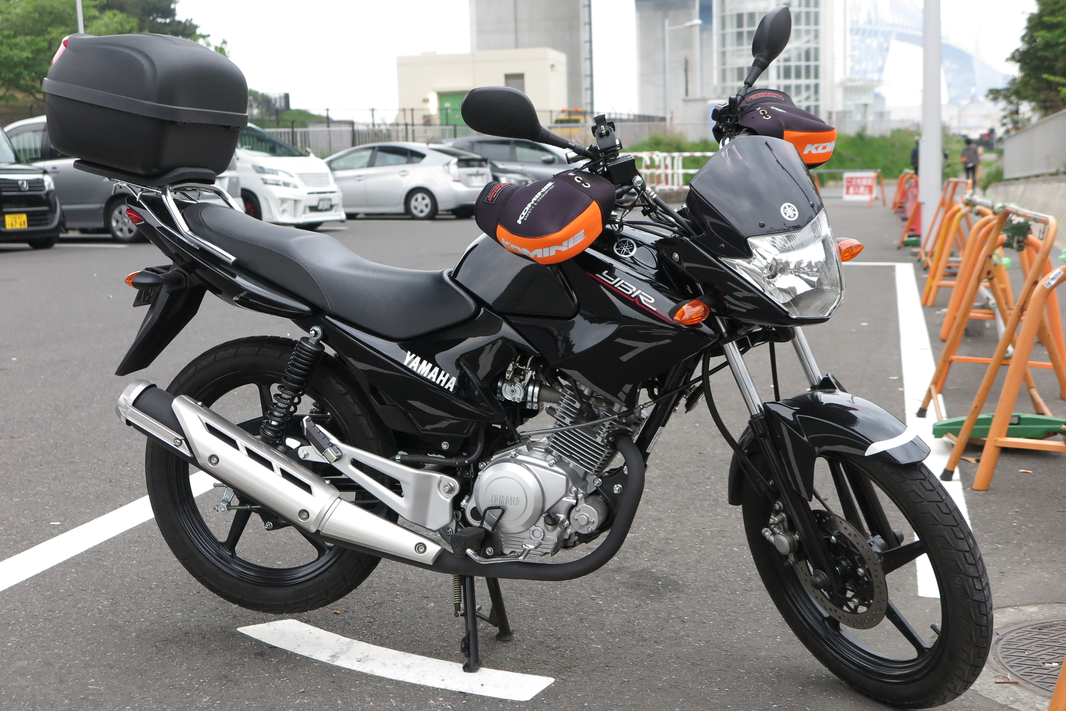 YBR125ED（2014年モデル）のフロント